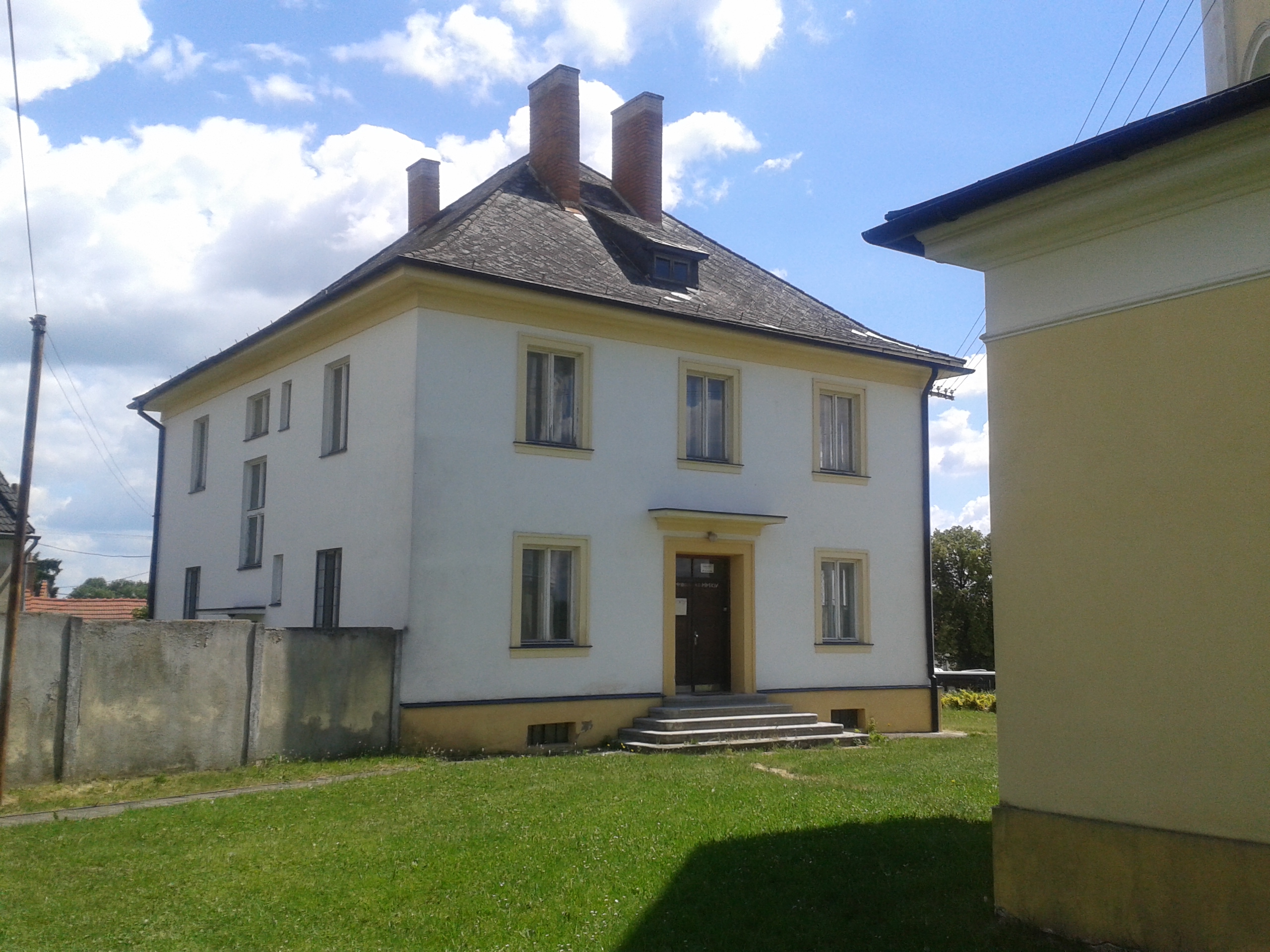 Fara Drysice